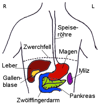 Lage der Oberbauchorgane. Lage einiger Organe. Anatomie und Physiologie: Lage einiger für die Verdauung relevanter Organe.